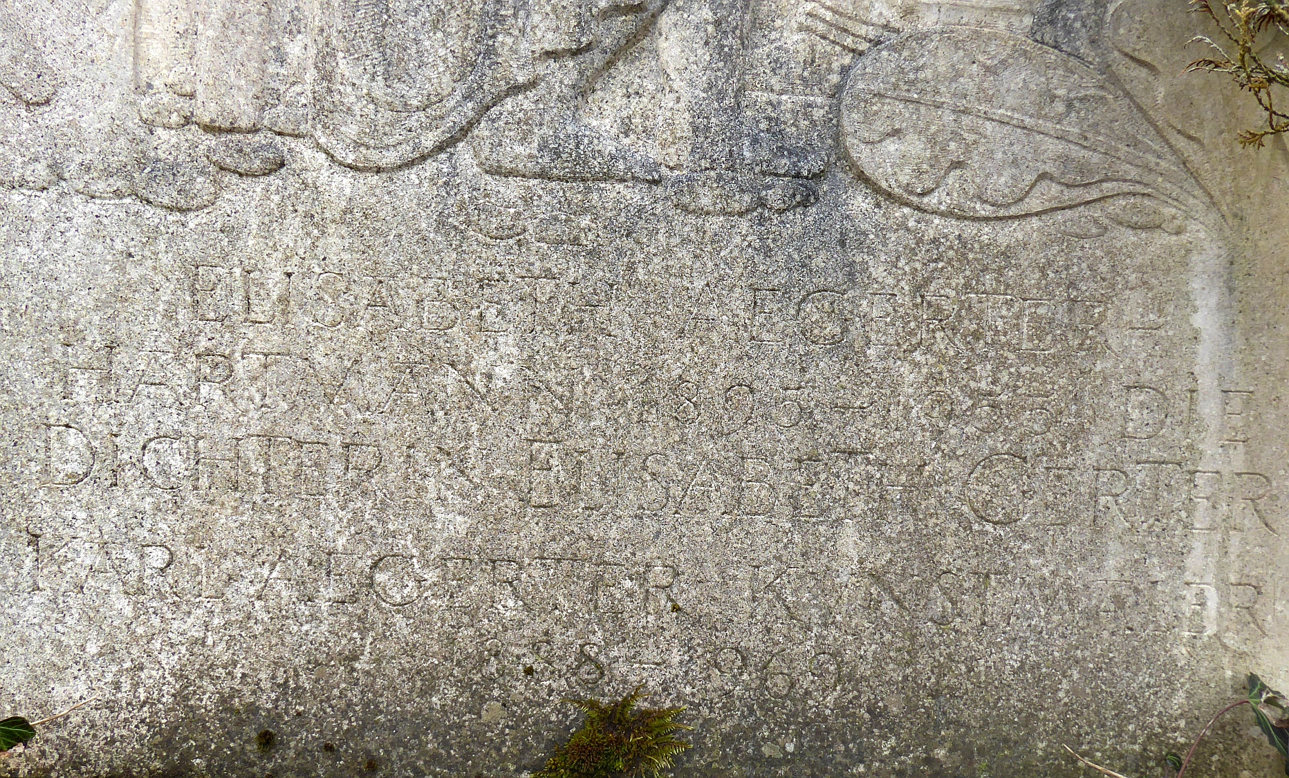 Elisabeth Gerter (1895–1955) Sozialkritische Schriftstellerin, Dichterin, Politikerin, Grab auf dem Friedhof Hörnli, Riehen, Basel-Stadt